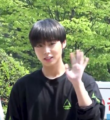 분쏘단 꿀케미~